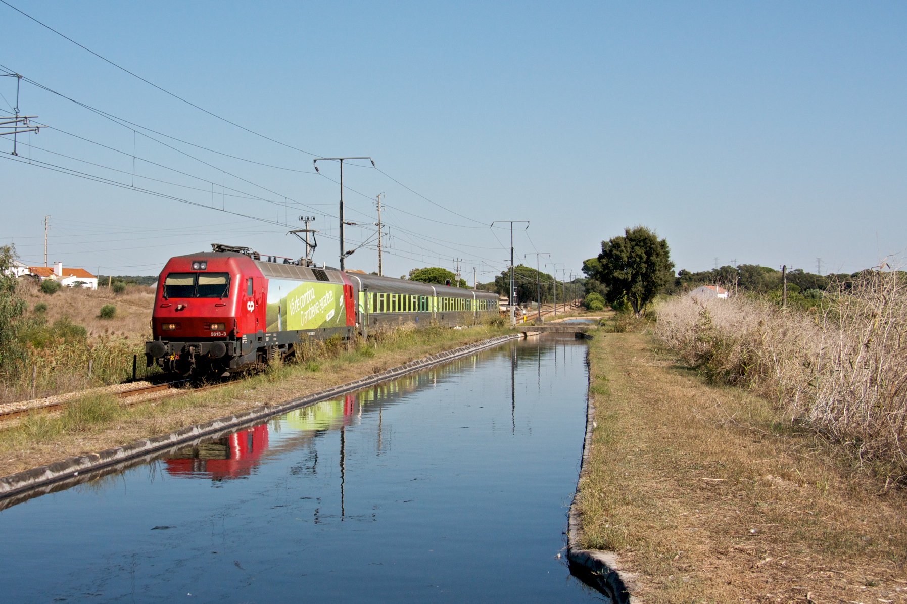 Tipo: Comboio Intercidades 672 [Faro - Lisboa • Oriente] Local: Estação de Monte Novo • Palma [Linha do Sul , PK 64] Data e hora: 13 de Setembro de 2011 [15h59] Material: Locomotiva 5613 + 3 carruagens Sorefame Renovadas esta fotografia foi publicada no . [ENG] CP 5613 with an Intercity train to Lisbon.